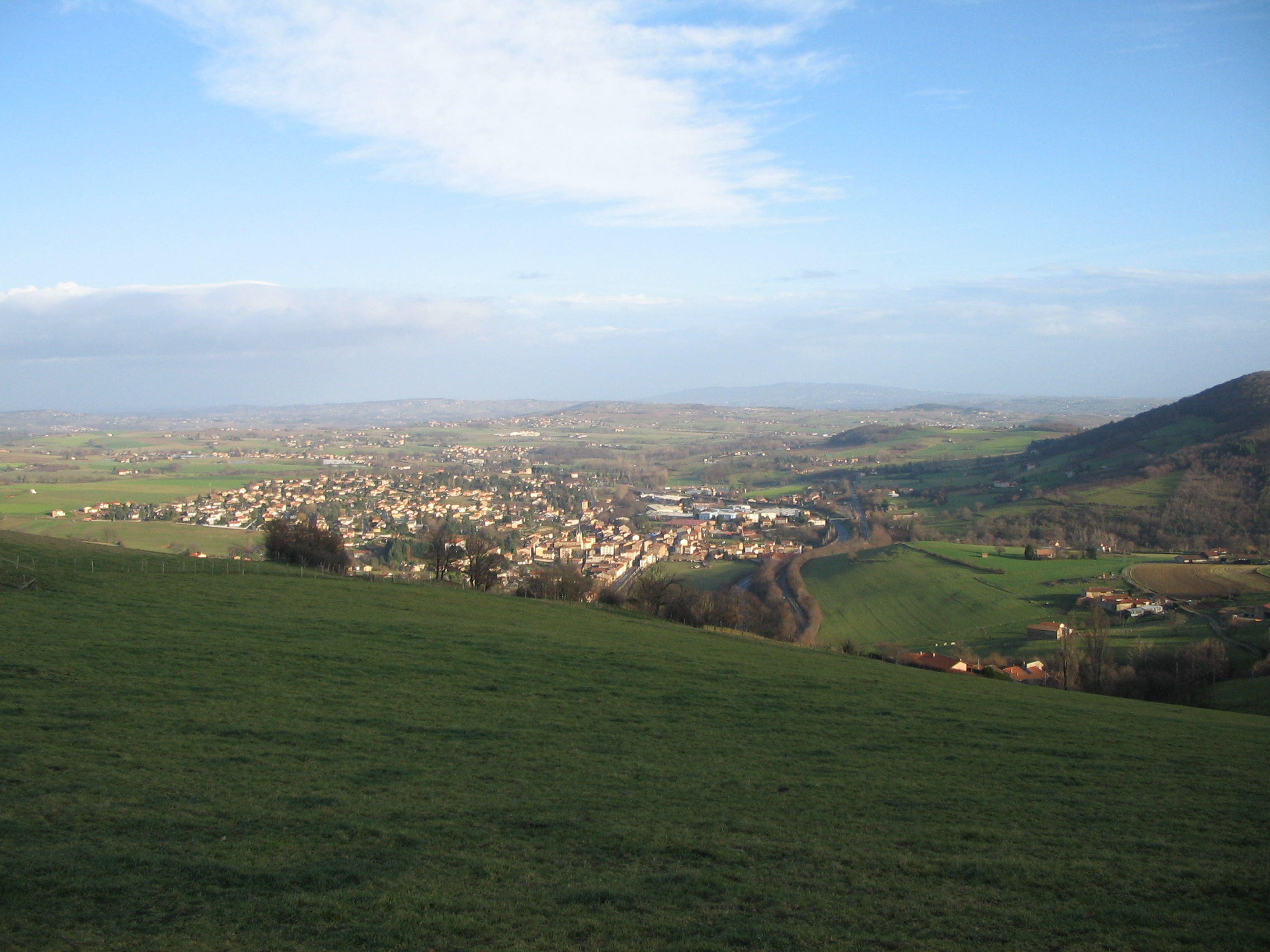 Pontcharra sur Turdine (Rhône) un jour de l'an, depuis hameau de Grévilly -- commune de St-Forgeux.